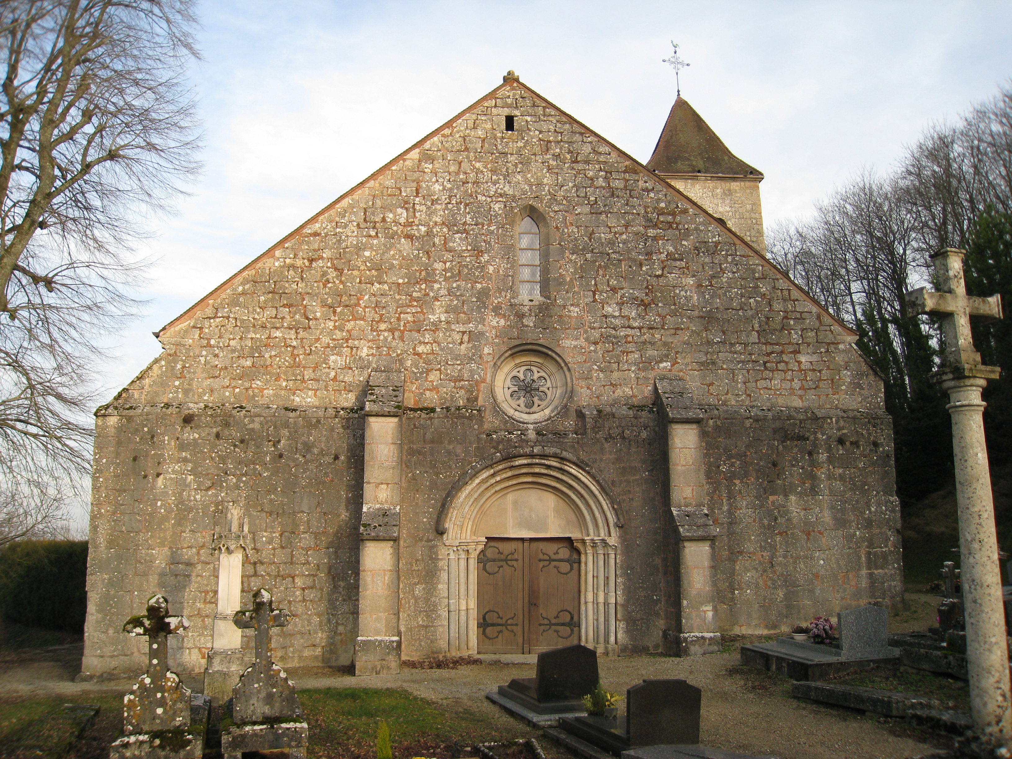 église de Montsaugeon